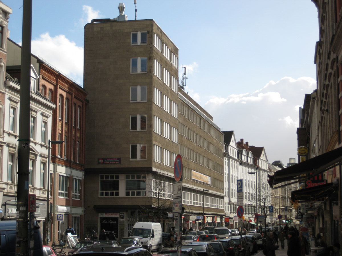 Schulterblatt / Kontorhaus Montblanc